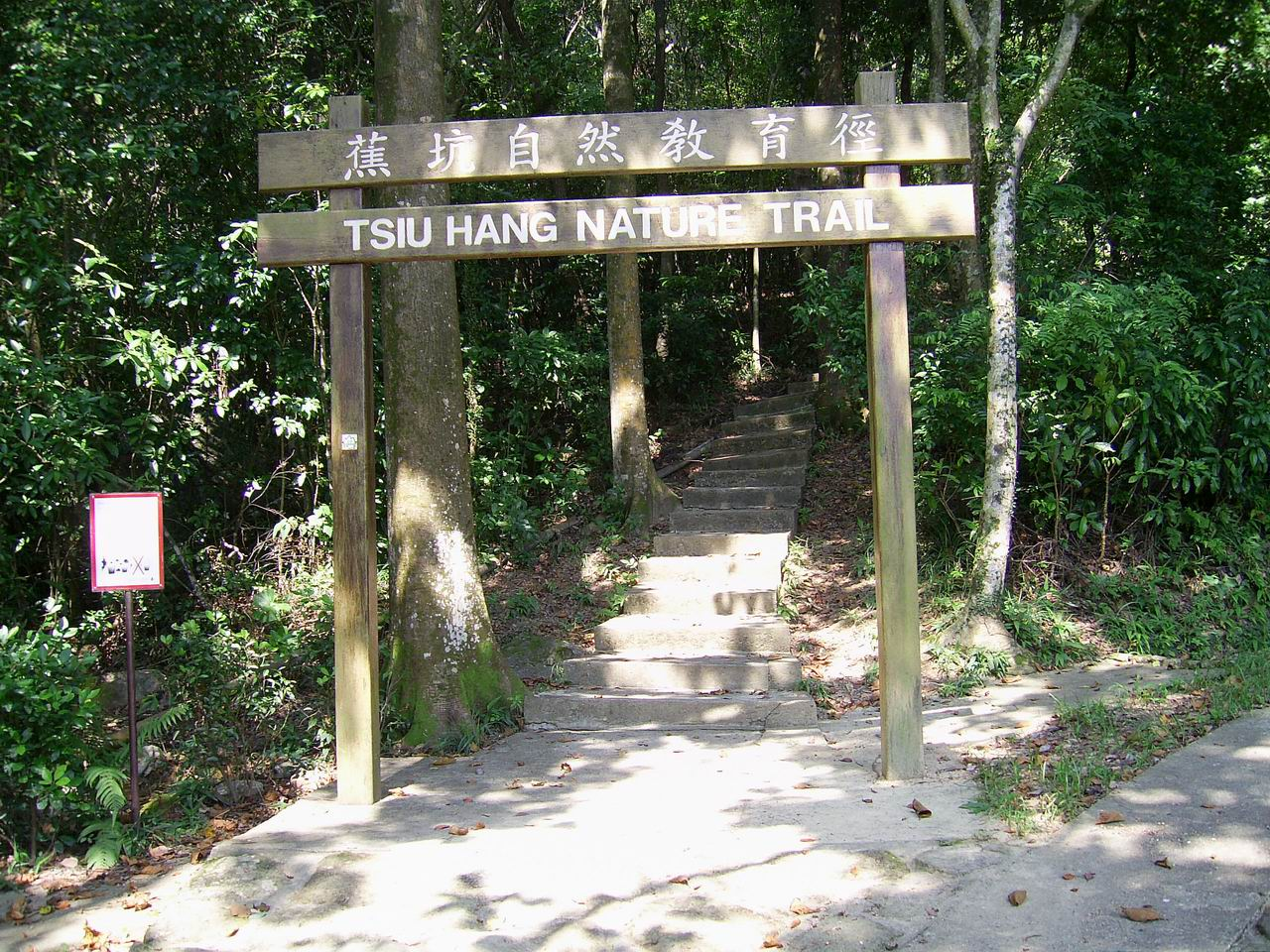 中文（香港）: 蕉坑自然教育徑